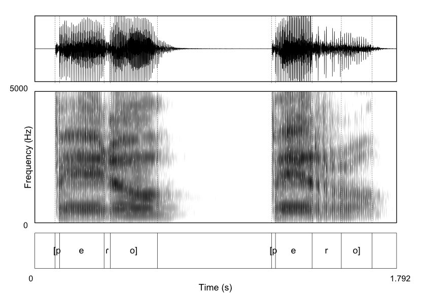 Esta imagen muestra las características acústicas de dos palabras en español que se diferencian únicamente en un fonema. A la izquierda se observa la producción de la palabra "pero" (con una vibrante simple). A la derecha se observa la producción de la palabra "perro" (con una vibrante múltiple prototípica)